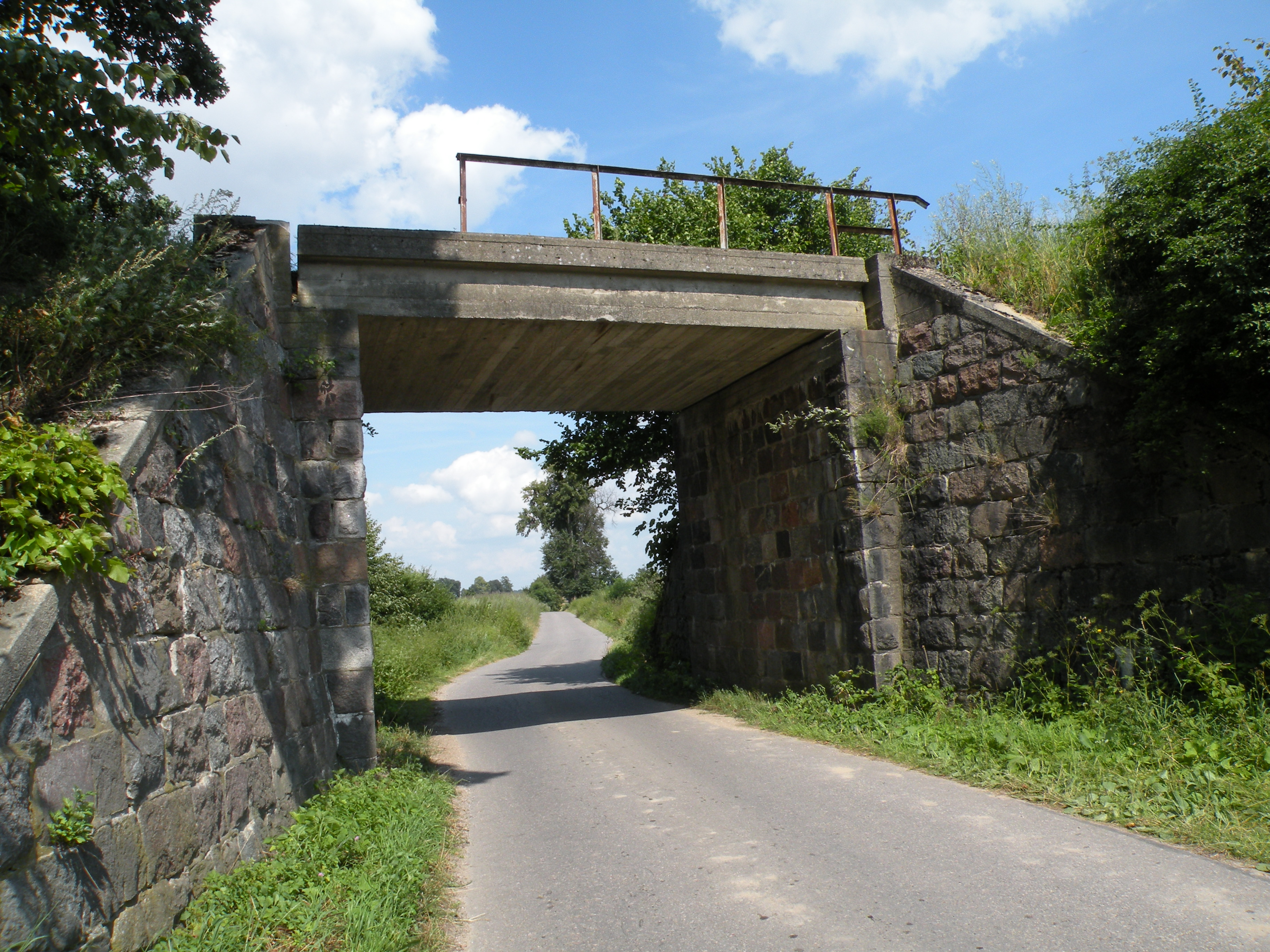 Królikowo (gmina Stary Dzierzgoń), most kolejowy na północ od osady, na drodze do wsi Lipiec, linia kolejowa została już całkowicie rozebrana.